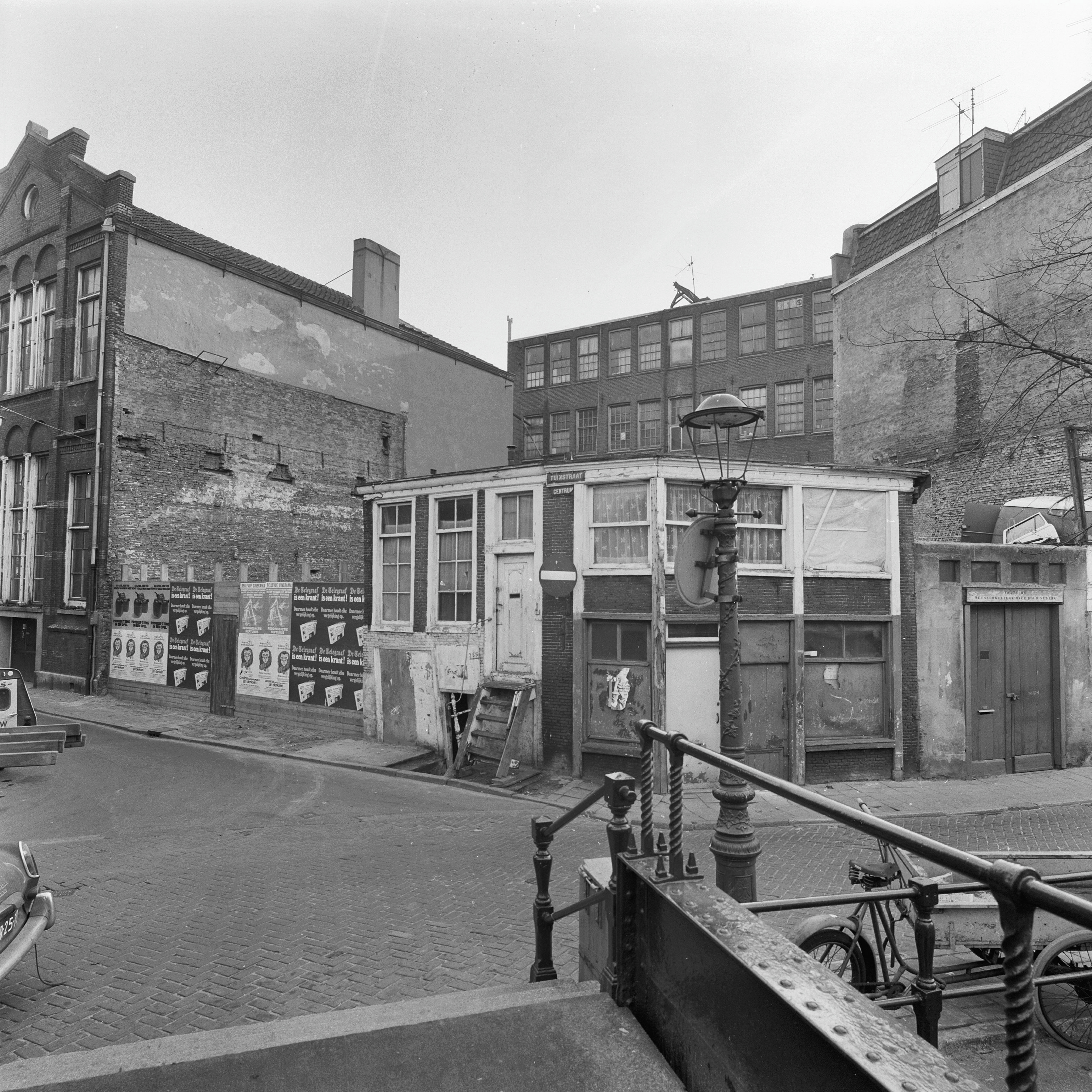 hoek Lijnbaansgracht, voorgevels